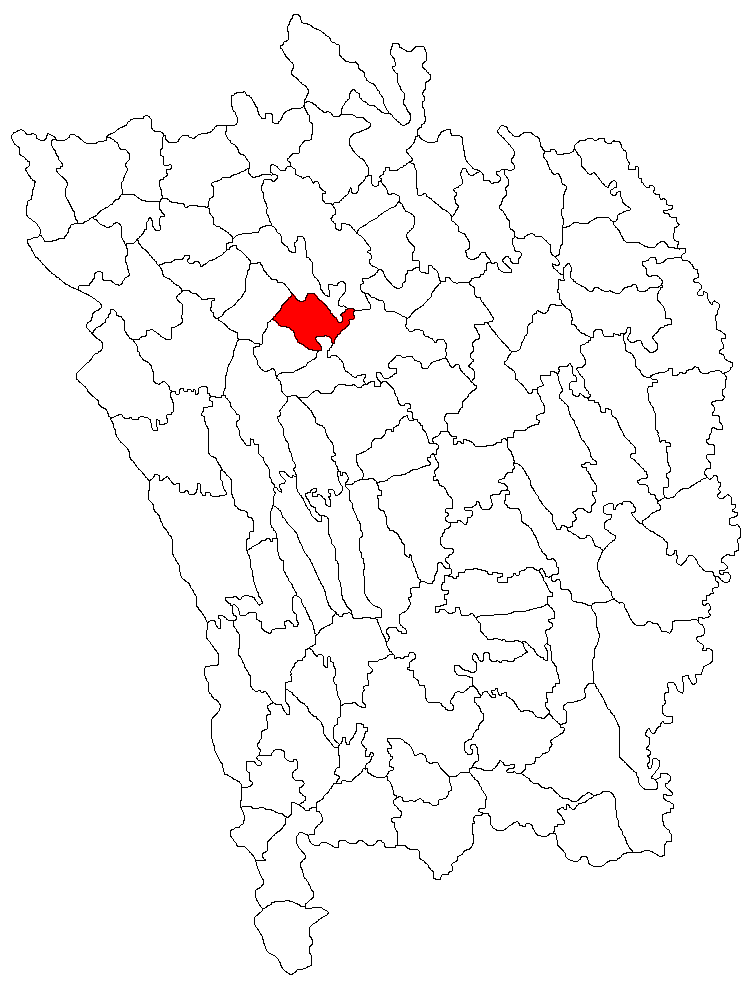 Categorie:Hărţi ale judeţului Vaslui